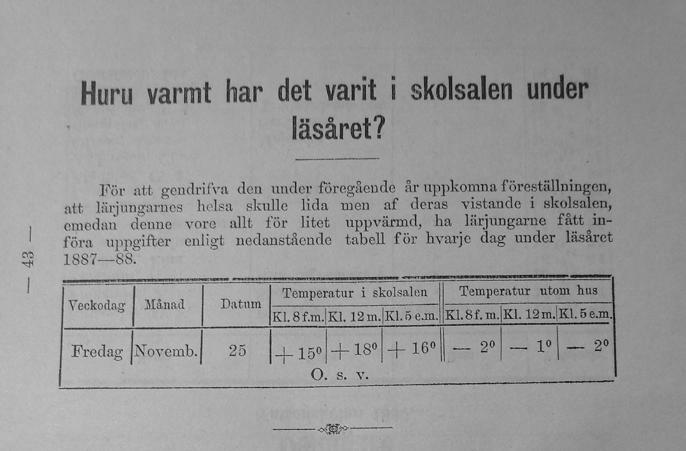 Problem med värme i skolsalen